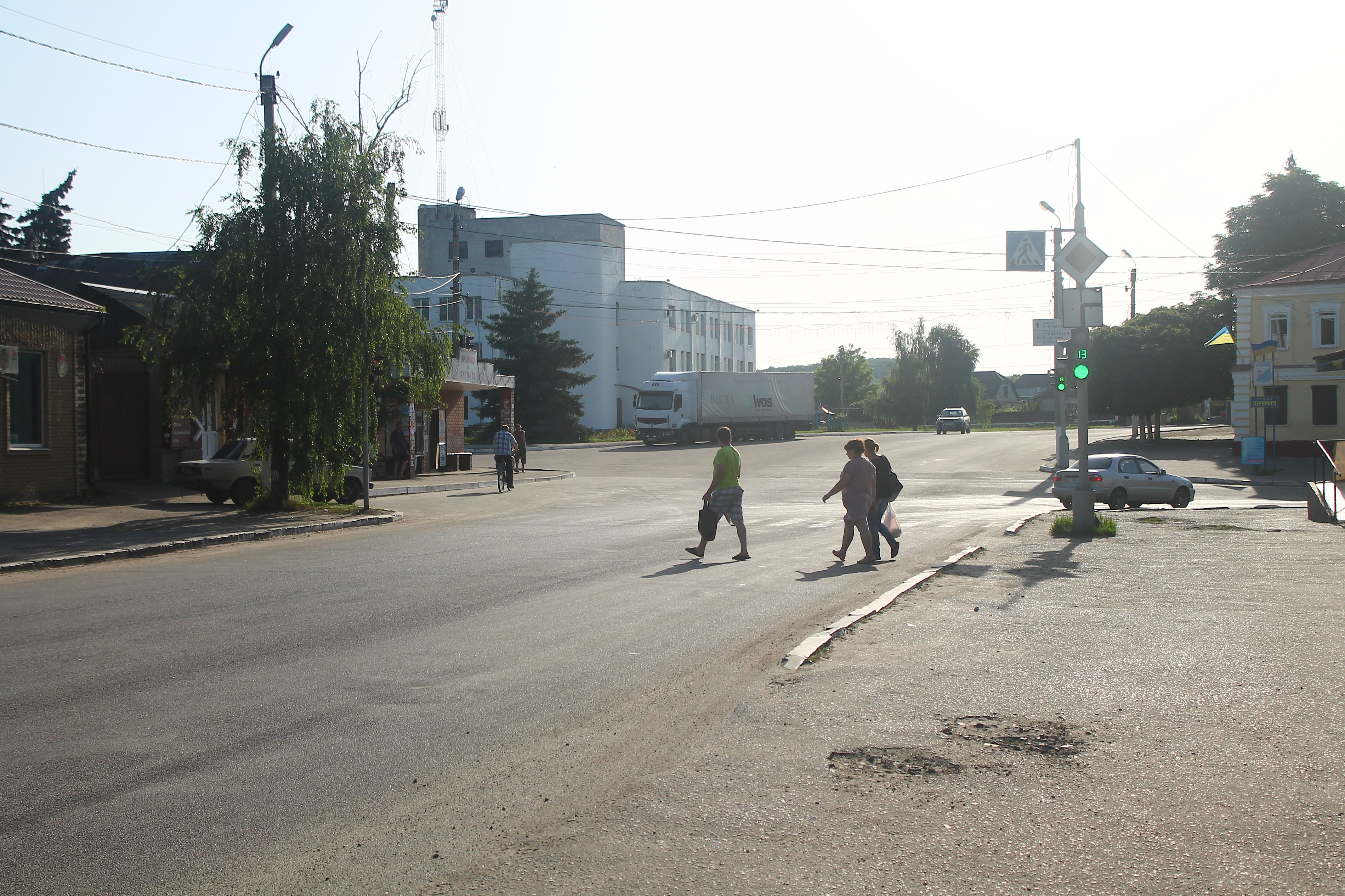 На фото зображено вулицю у місті Дергачі Харківської області. На передньому плані - пішохідний перехід, який переходять люди. На середньому плані зліва - автобусна зупинка. На дальньому плані зліва - місцевий Будинок культури, що стоїть на площі Перемоги.